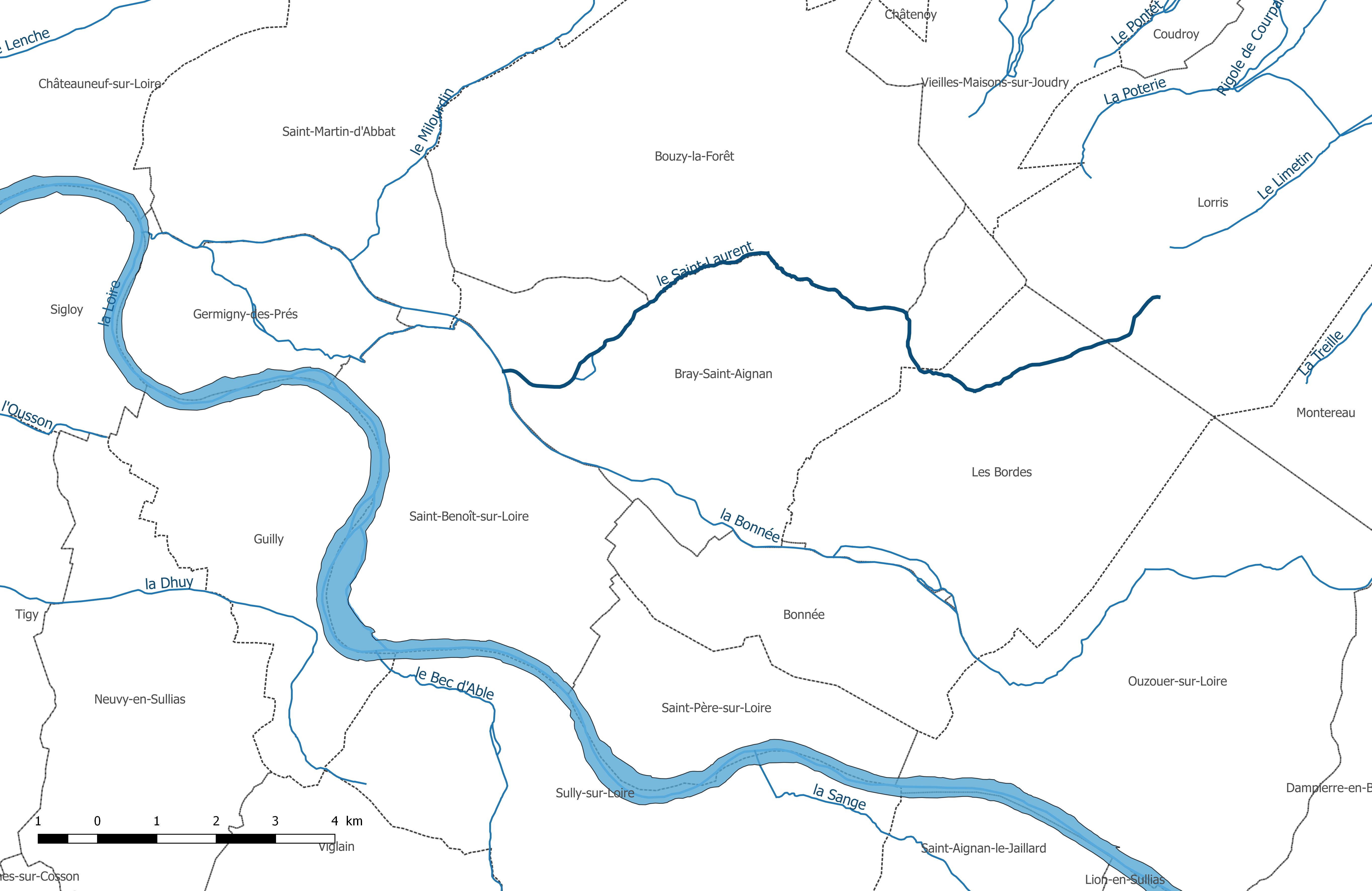 Carte du cours d'eau "le Saint-Laurent", dans le département du Loiret.